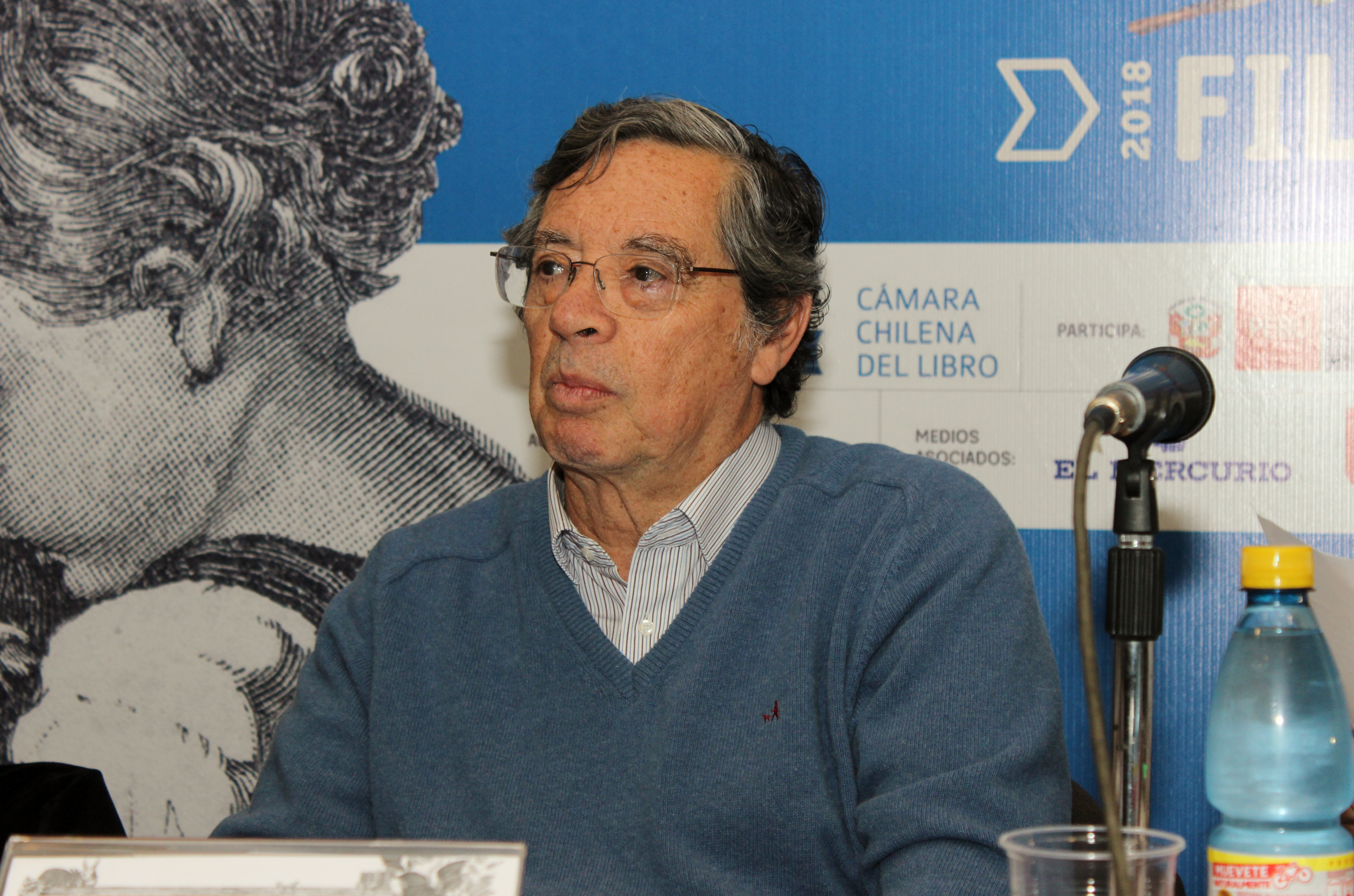 Carlos Ruiz Schneider, decano de la Facultad de Filosofía y Humanidades de la Universidad de Chile, durante la presentación de Política, igualdad emancipación. Escenas filosóficas en América Latina y Francia, libro del que, junto con el filósofo francés Patrice Vermeren y la profesora universitaria Claudia Gutiérrez, es editor (sala Acario Cotapos, 26 de octubre).